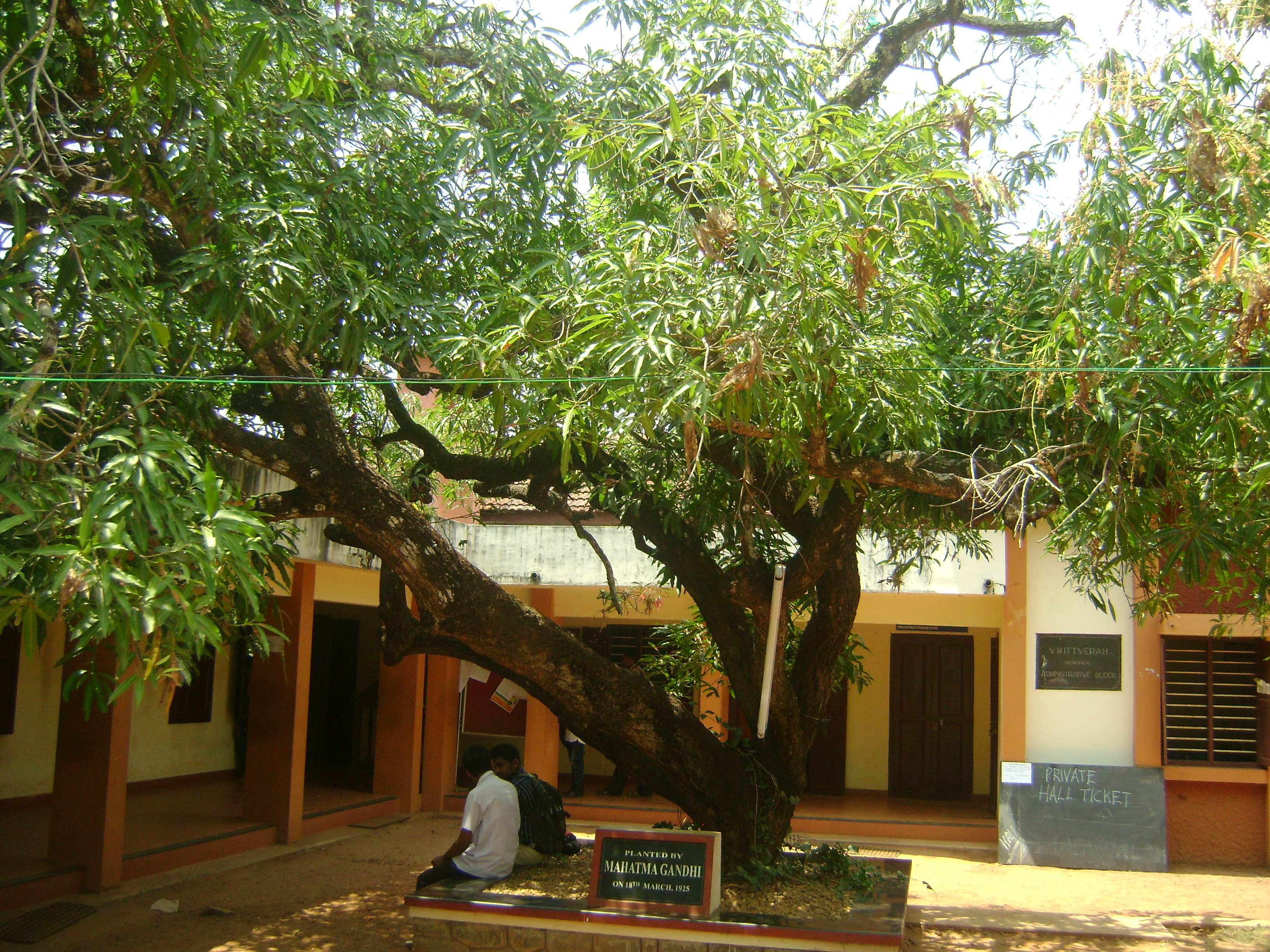 ആലുവ യൂണിയന്‍ ക്രിസ്ത്യന്‍ കോളേജില്‍ ഗാന്ധിജി 1925 മാര്‍ച്ച് 18 നട്ട മാവ്